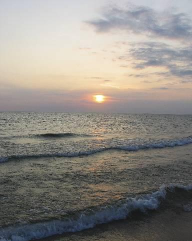 Lake Michigan Sunset.